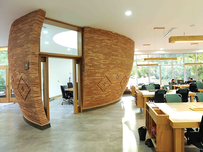 اتاق جلسه، کنفرانس، آتریوم در فضاهای کار مشترک موجود است.